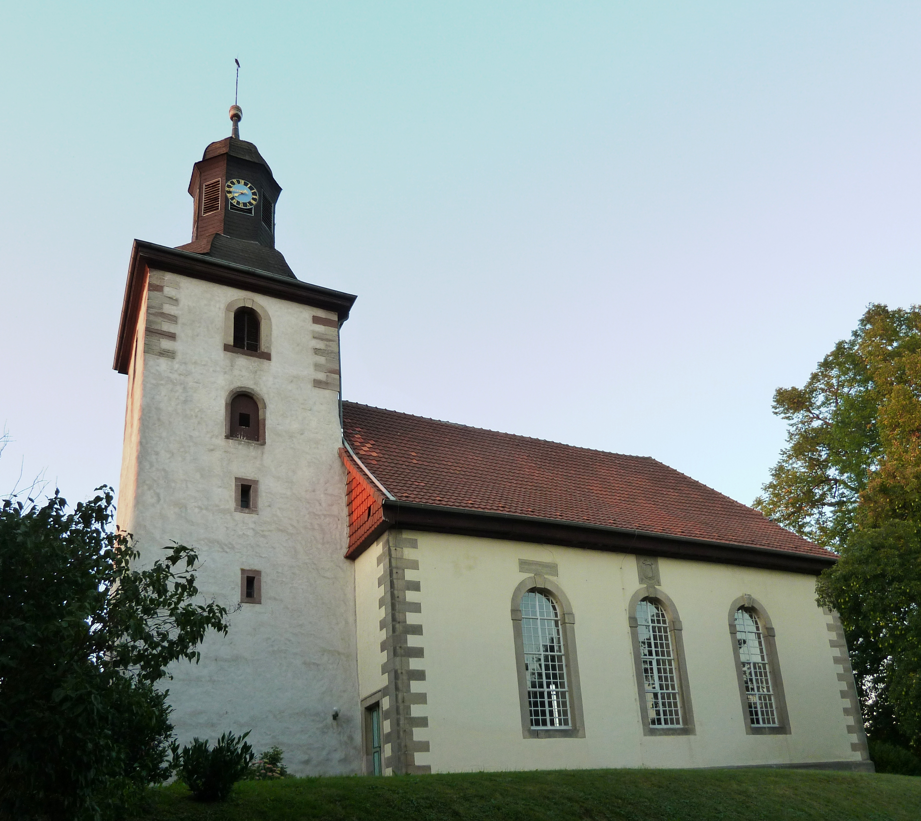 Ev.-luth. Kirche St. Bartholomäi in Beienrode, Gemeinde Gleichen, Südniedersachsen. Barocke Saalkirche, dat. 1732, 1983-85 Instandsetzung